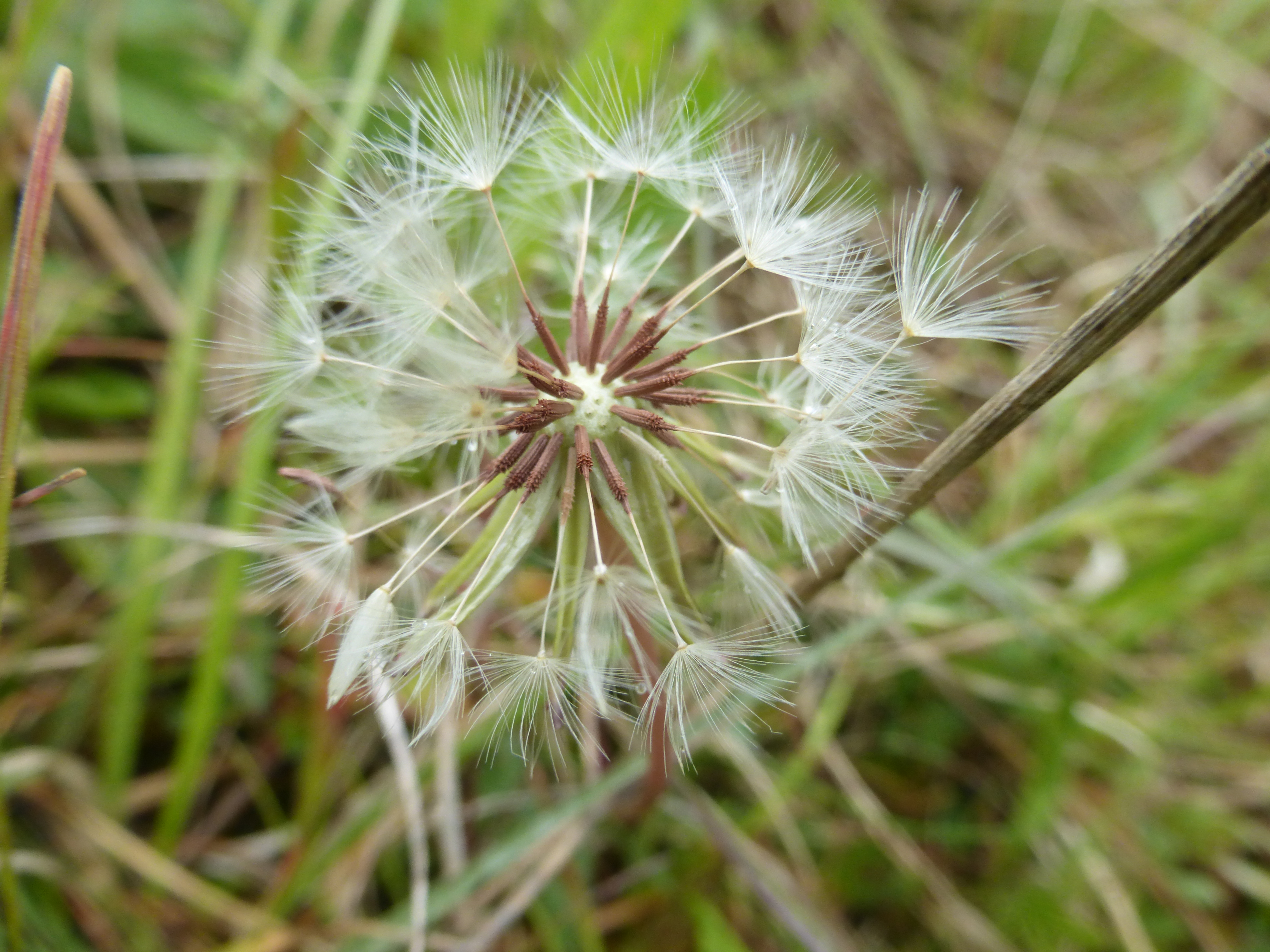 Geröteter Löwenzahn (Taraxacum rubicundum) Siegental Markgröningen 9. Mai 2017